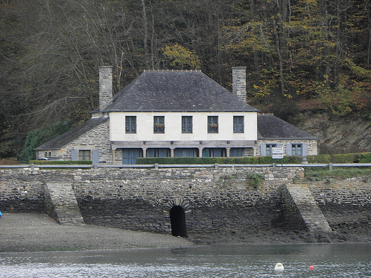 Maison Le clique à Morlaix (29).